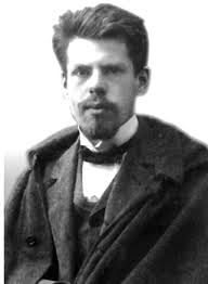 Євген Слуцький - економіст, статистик і математик.